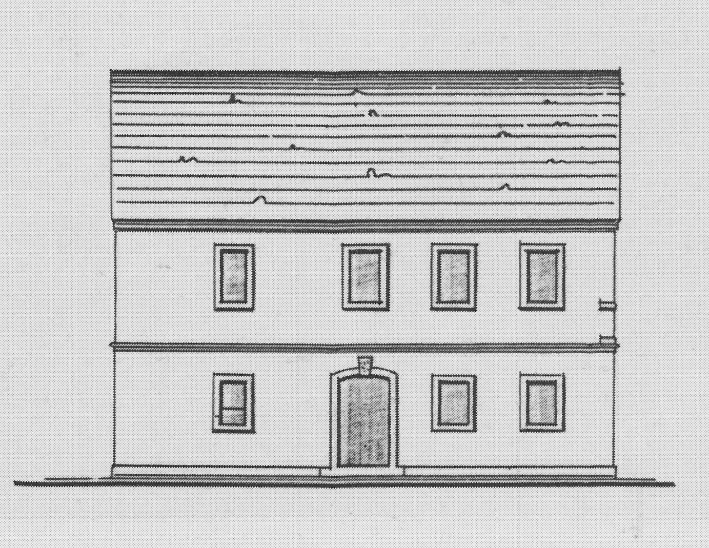 Radebeul, Bauernhaus Winzerstraße 79, Bauzeichnung